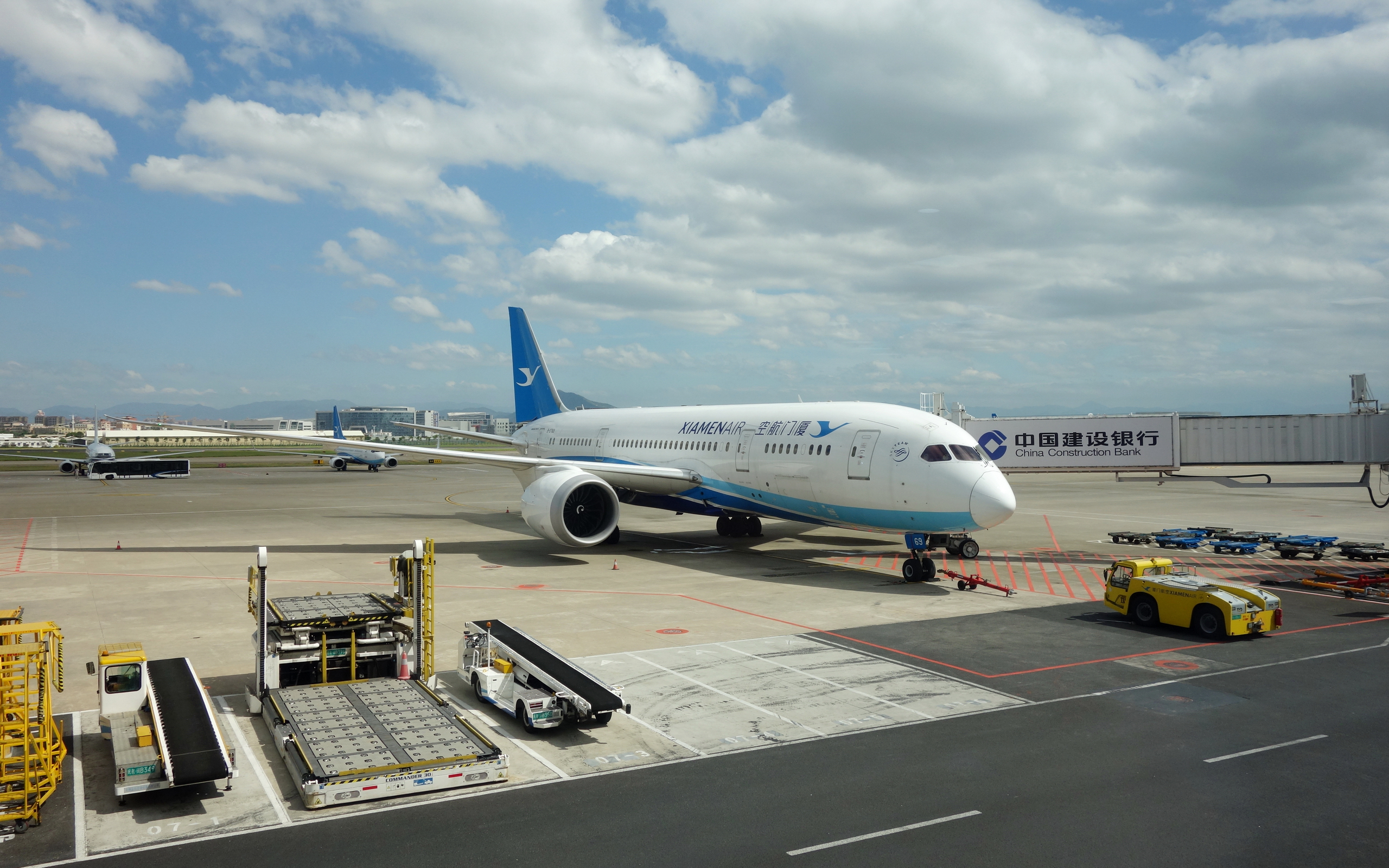 厦门航空公司Boeing 787-8 (注册号B-2769) 客机在厦门高崎机场